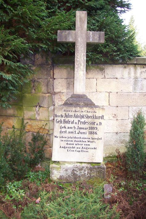 Grabmal J. A. Stöckhardt auf dem Friedfhof in Tharandt